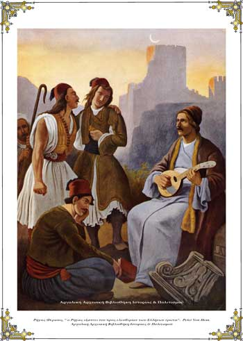 Ρήγας Φεραίος, «ο Ρήγας εξάπτει τον προς ελευθερίαν των Ελλήνων έρωτα»